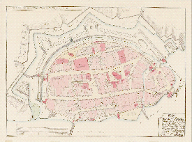 Cadastral Map of Spandau, 1728